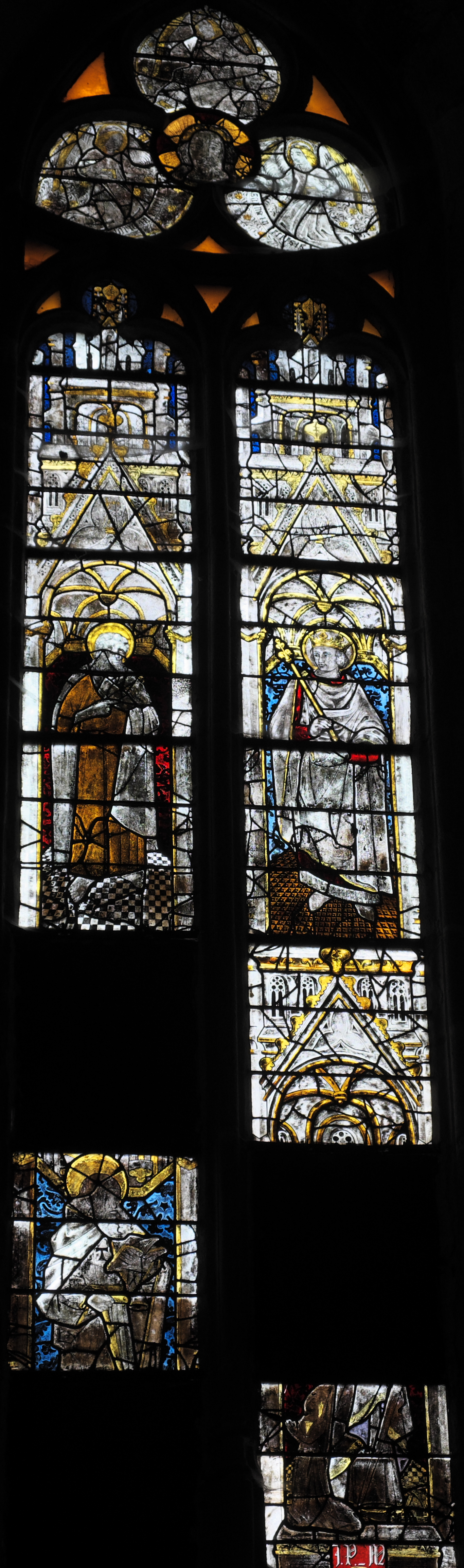 Stiftskirche Saint-Étienne in Eymoutiers im Département Haute-Vienne (Nouvelle-Aquitaine/Frankreich), Bleiglasfenster (Nr. 7) aus dem 15. Jahrhundert; Darstellung: Johannes der Täufer (links), Ludwig der Heilige (rechts), unten Fragmente